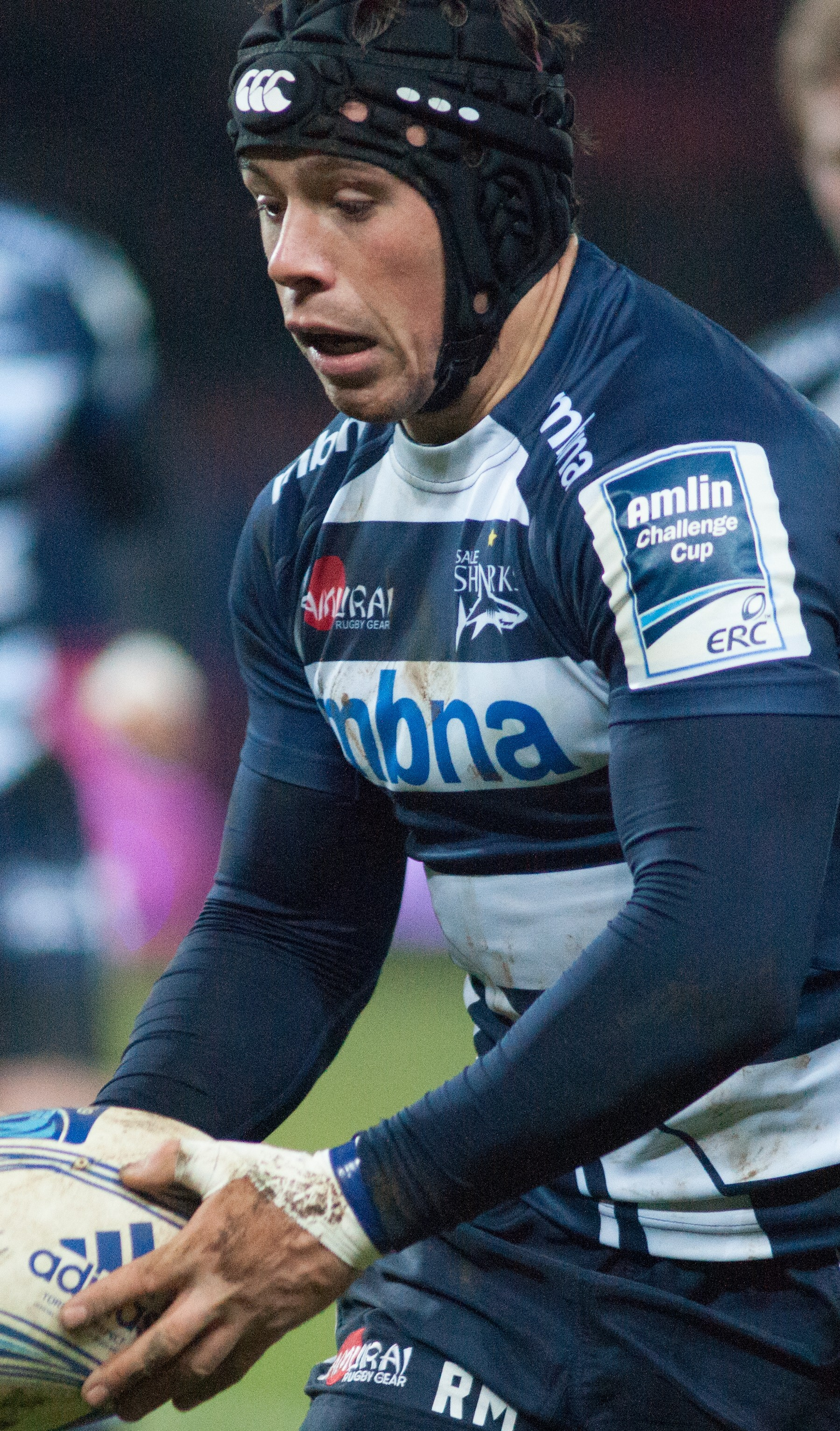 US Oyonnax c. Sale Sharks, 5 décembre 2013.